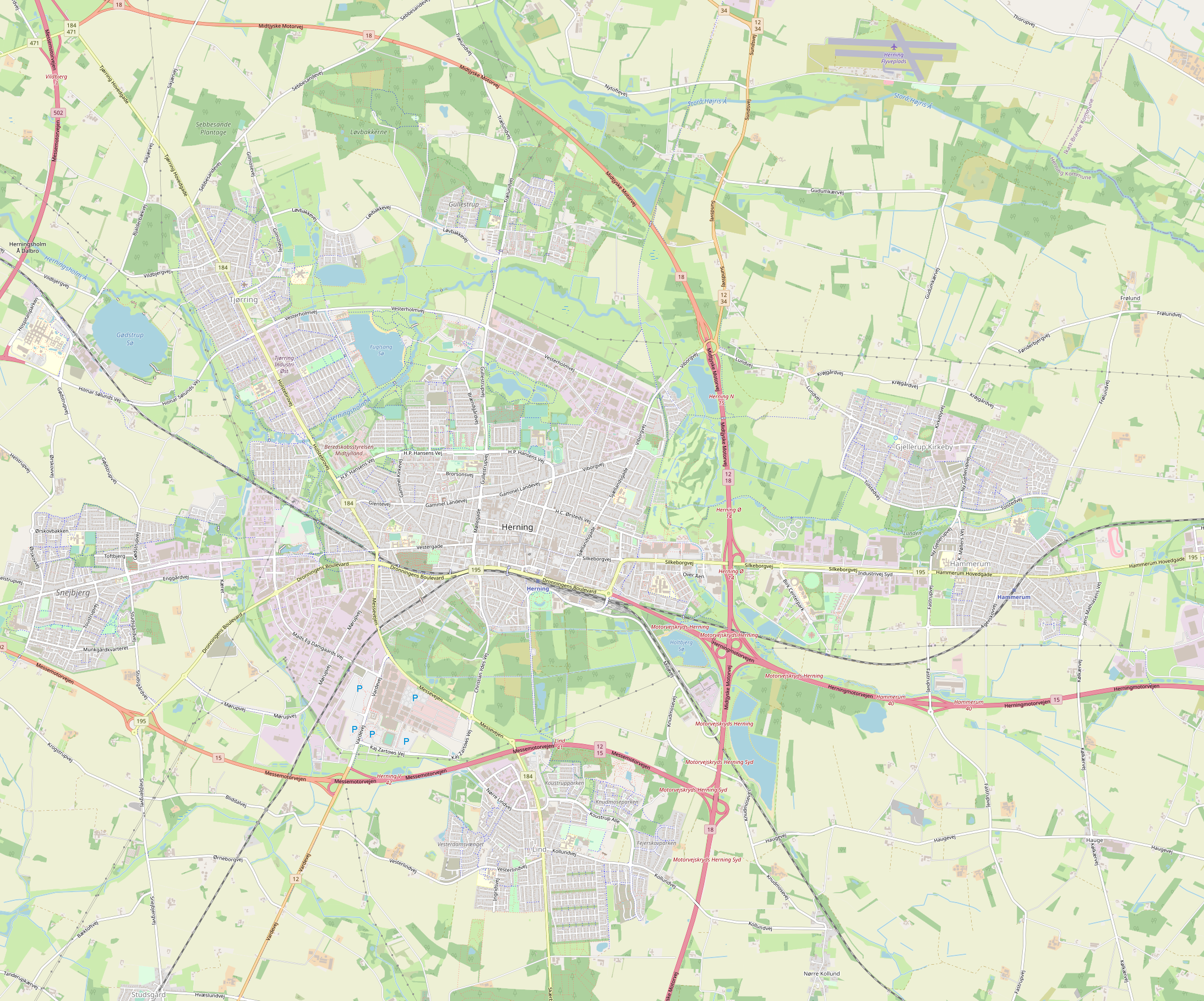 Kort over Herning.